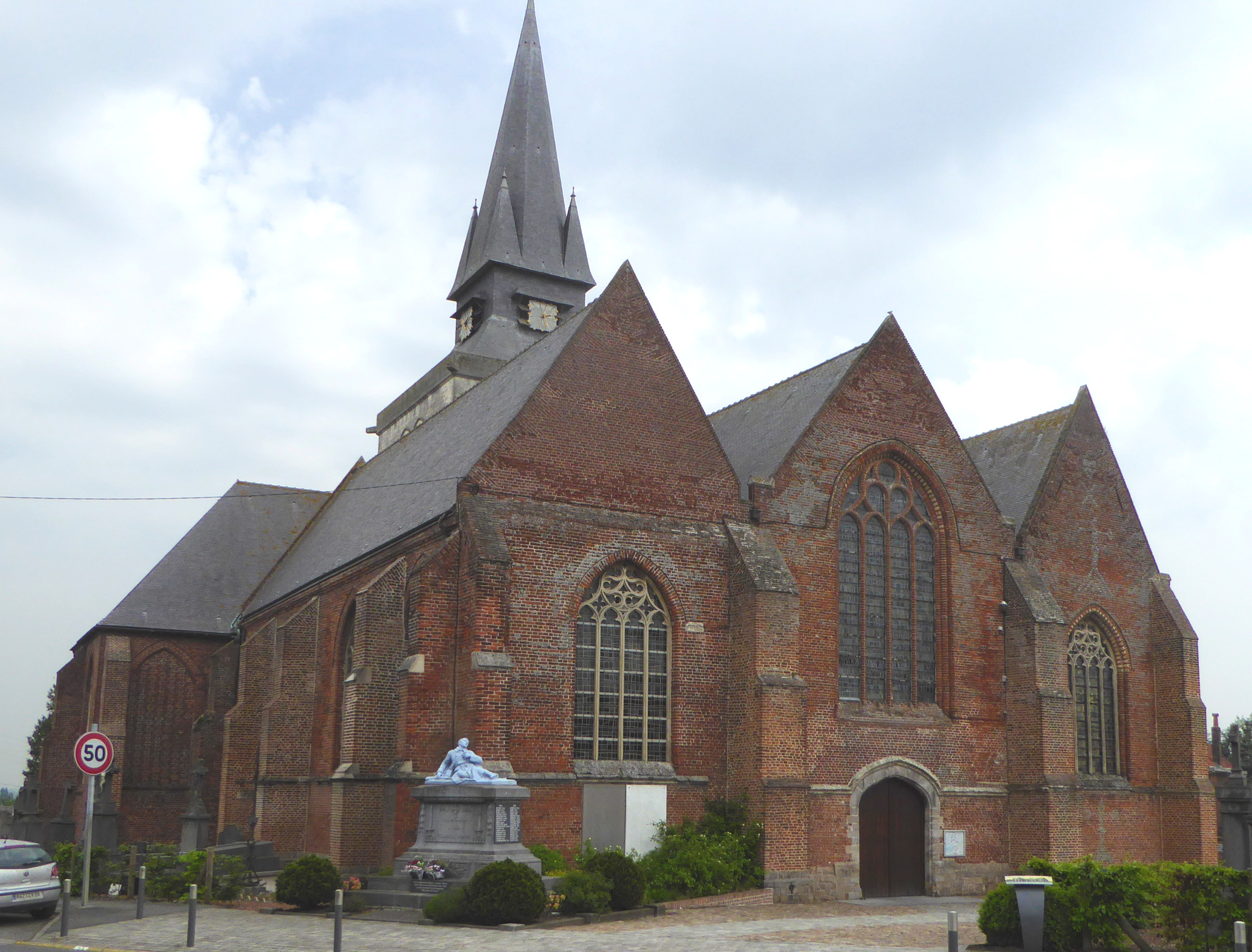 Église Saint-Firmin de Morbecque .